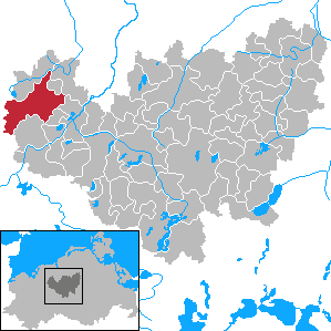 Bernitt in Mecklenburg-Vorpommern - District Güstrow